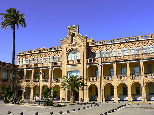 Asilo San Juan de Dios, Valencia, Spain. Hospital de la cadena Vithas, oficialmente denominado Vithas Valencia al Mar